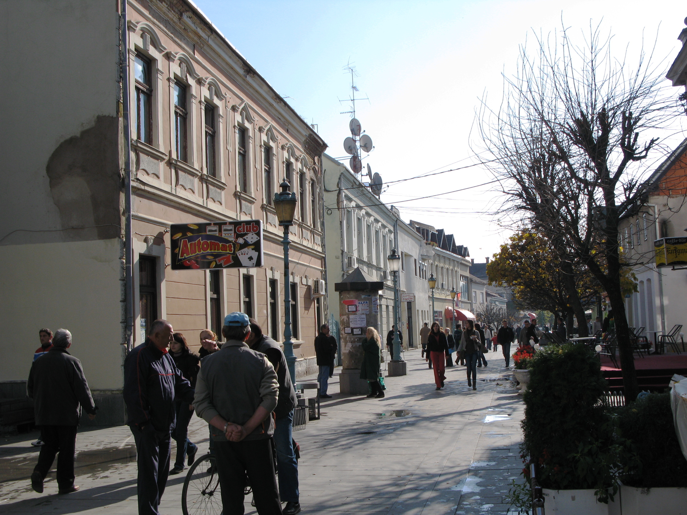 gradska promenada, Kozarska Dubica.